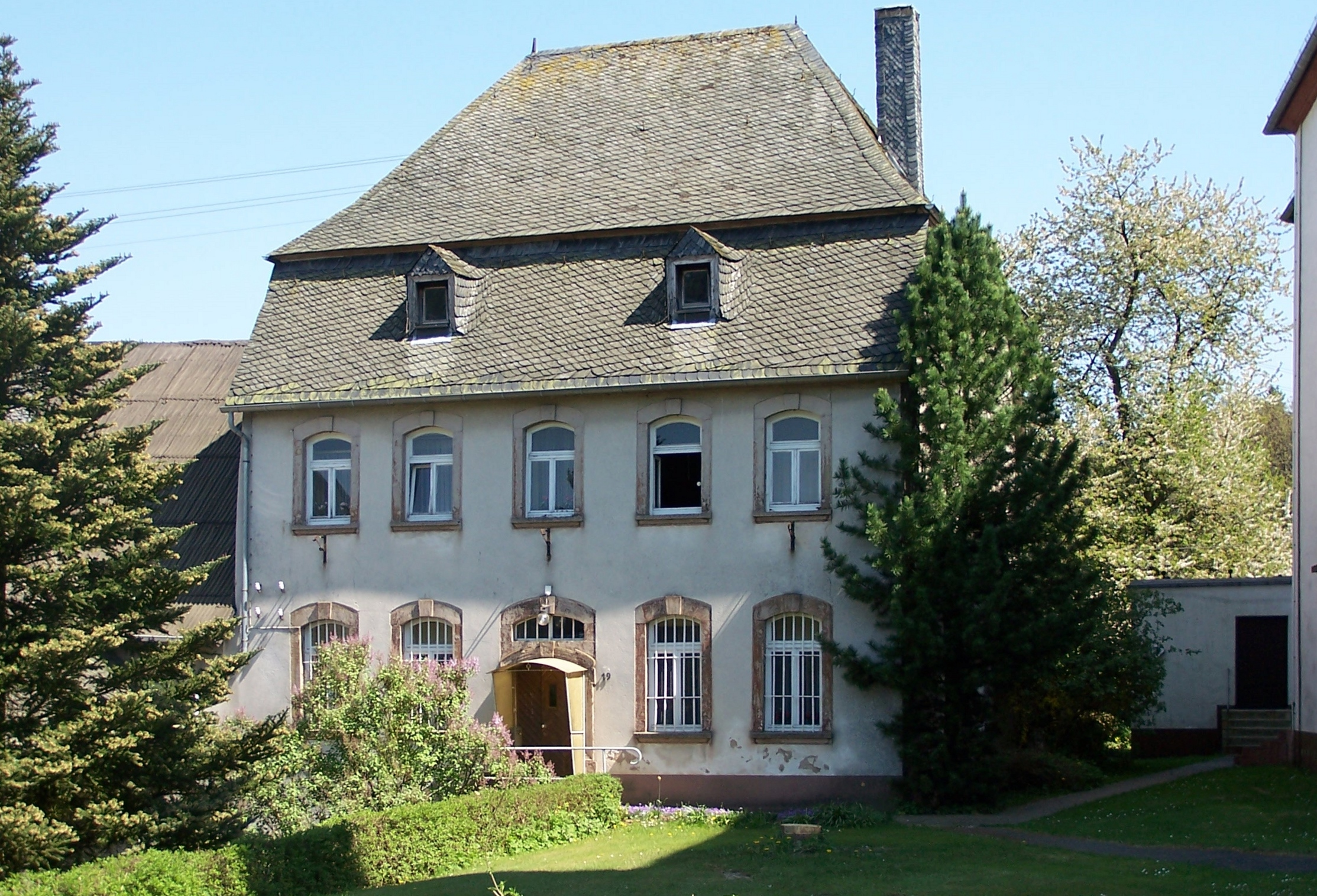 Bischofsdhron